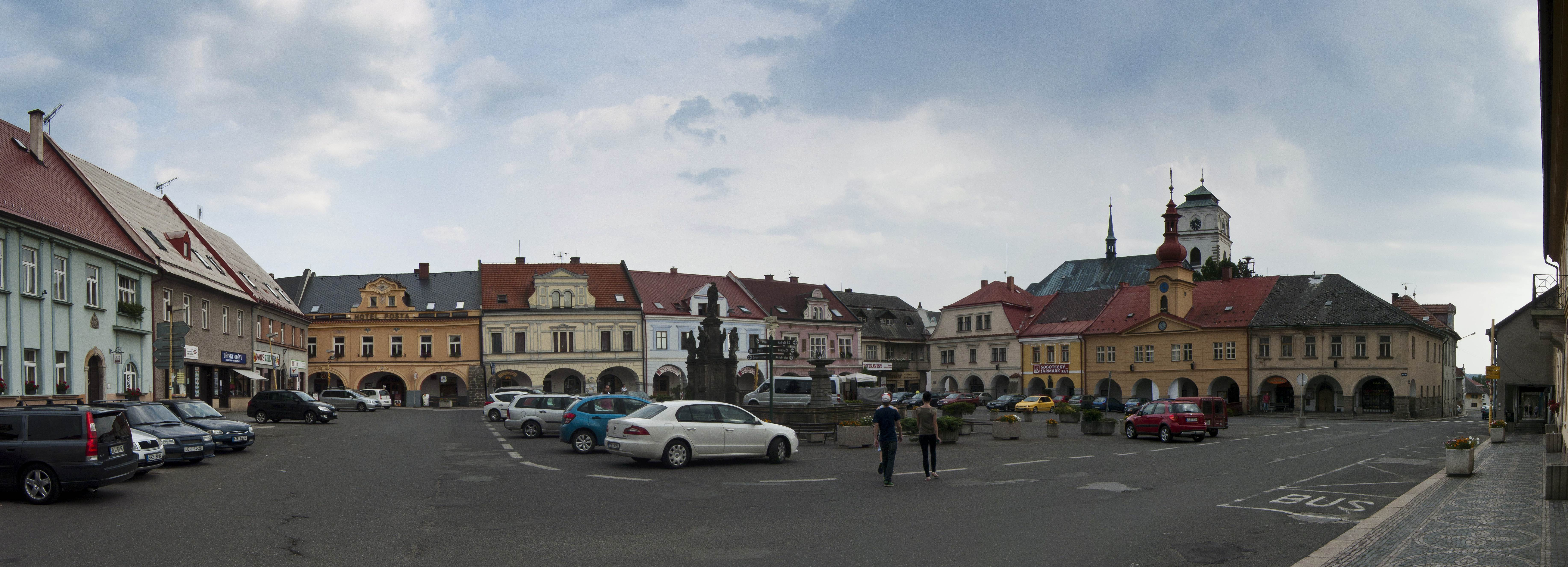 Sobotka - náměstí. Panorama.